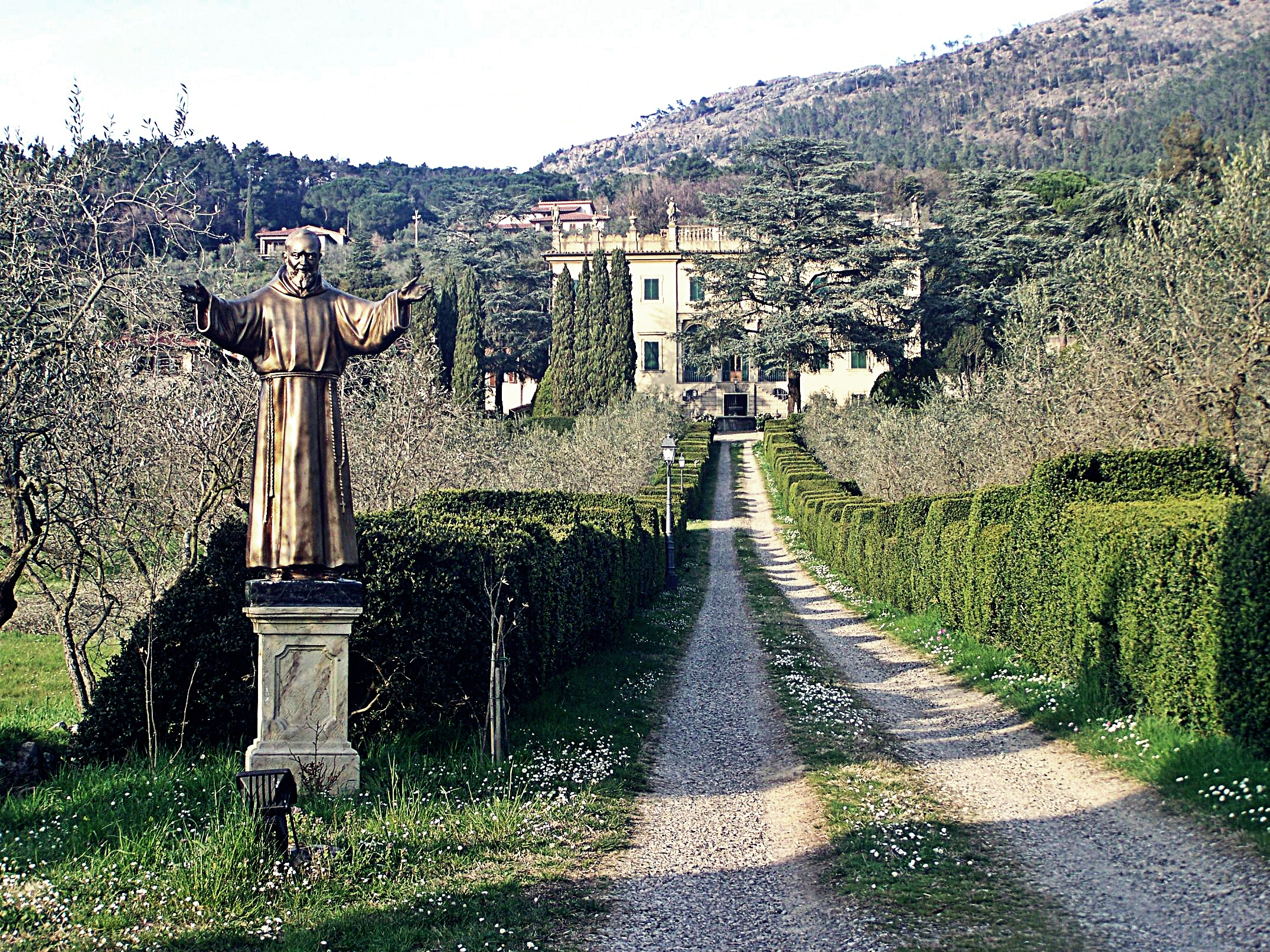 villa